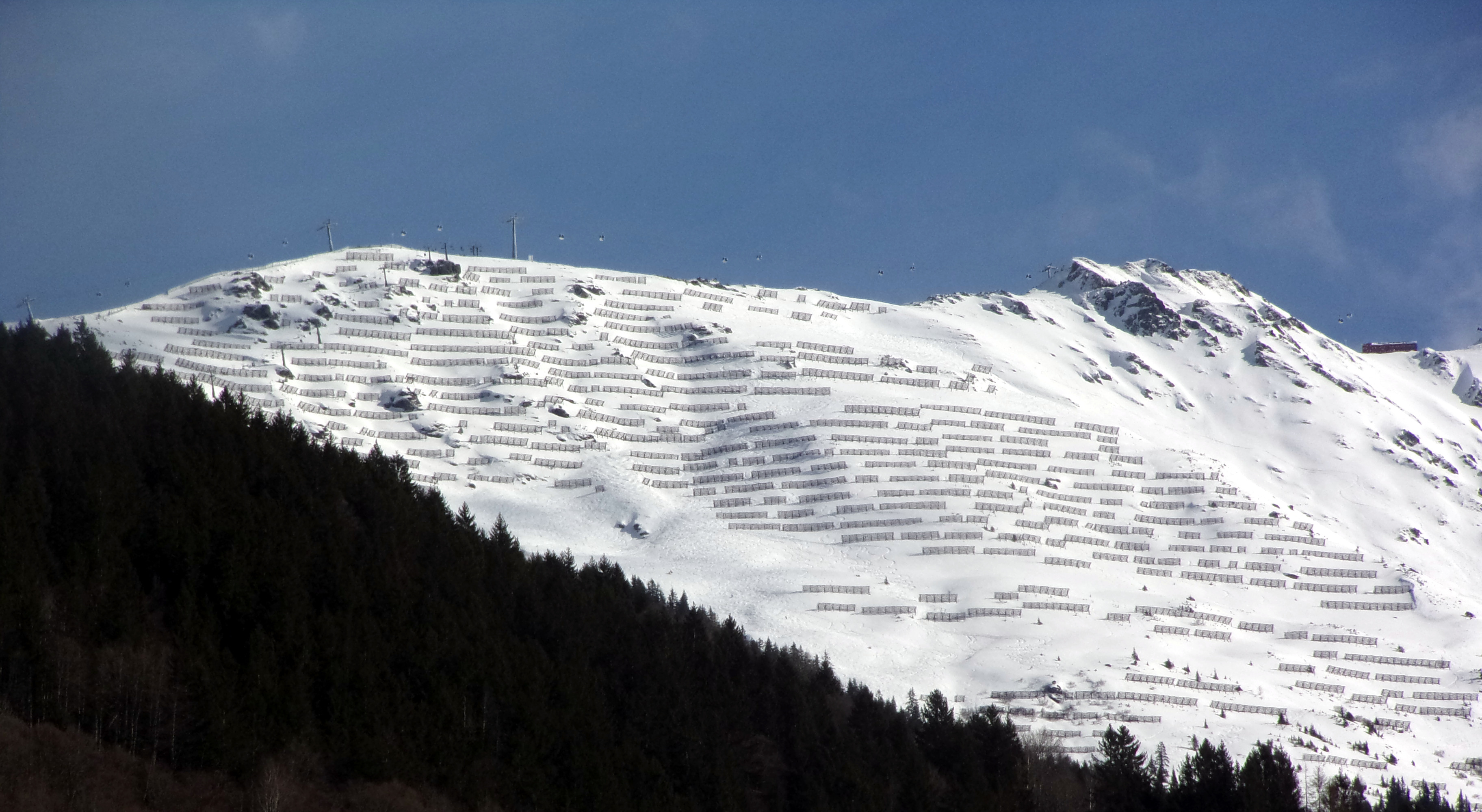 Seilbahnbau am Sennigrat ohne Rücksicht auf das Landschaftsbild